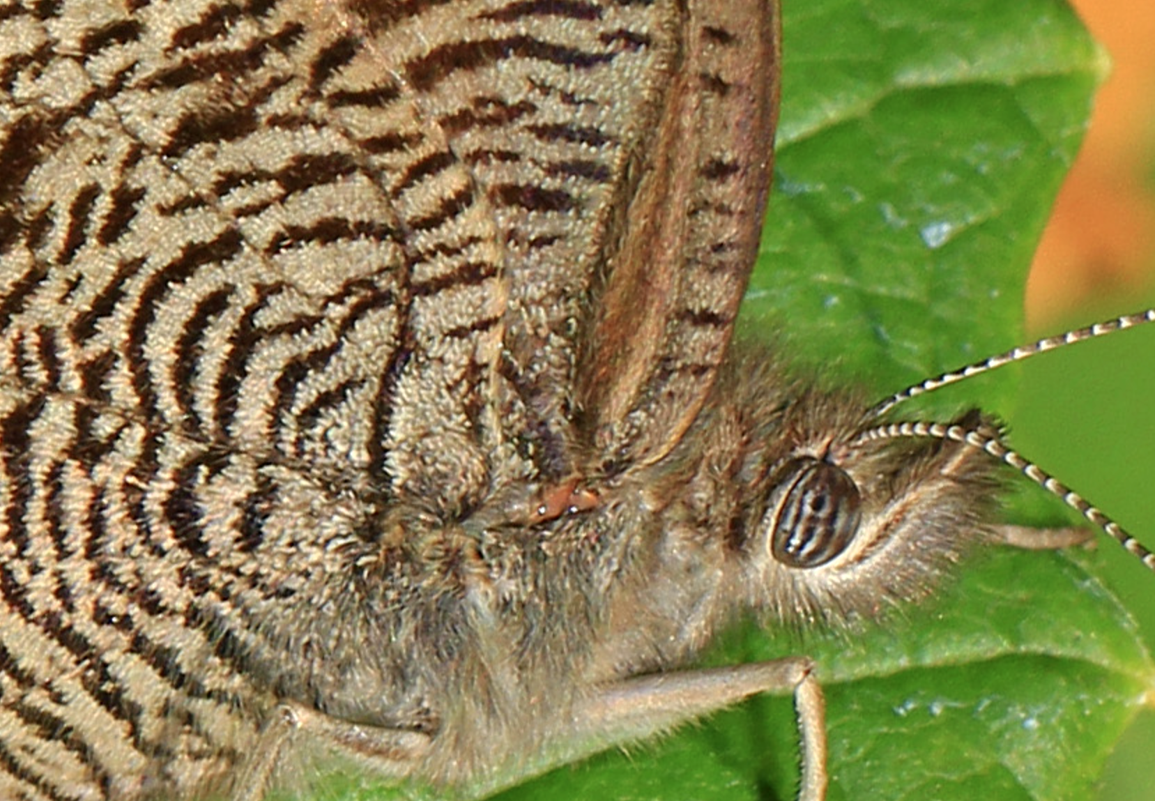 Zoom (vue rapprochée) sur la base des ailes du papillon Cercyonis pegala, d'après une photographie faite à l' Occoquan Bay National Wildlife Refuge par Judy Gallagher. Cette espèce présente des nervures inhabituellement gonflée, reliée à une oreille tympanique située sous l'aile, ce qui lui permet de percevoir des sons de basse-fréquence qu'il ne pourrait sans cela percevoir.